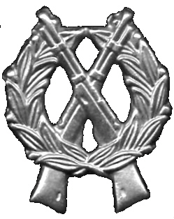 Własna praca Kwz